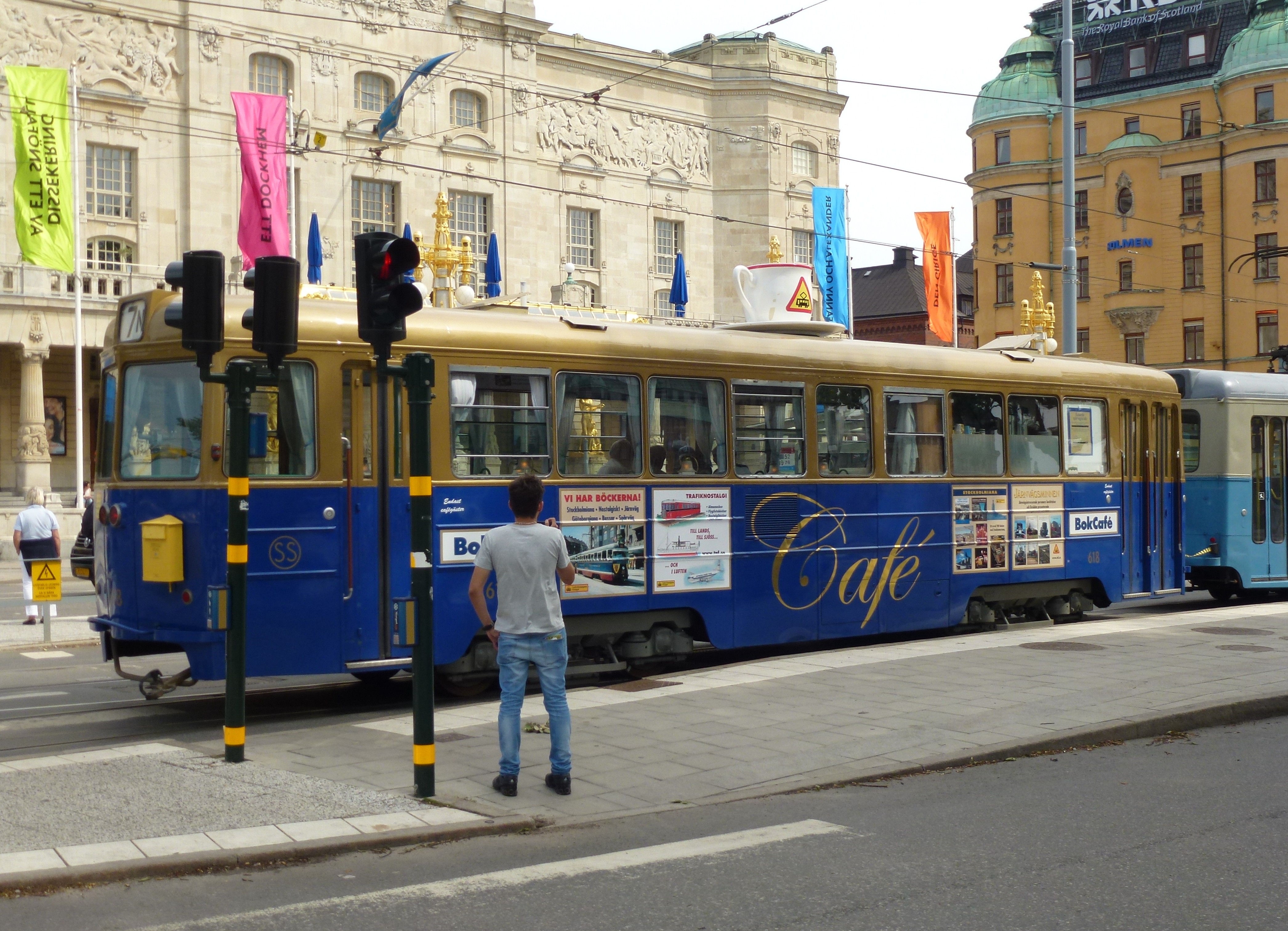 Djurgårdslinjens restaurangvagn på Nybroplan